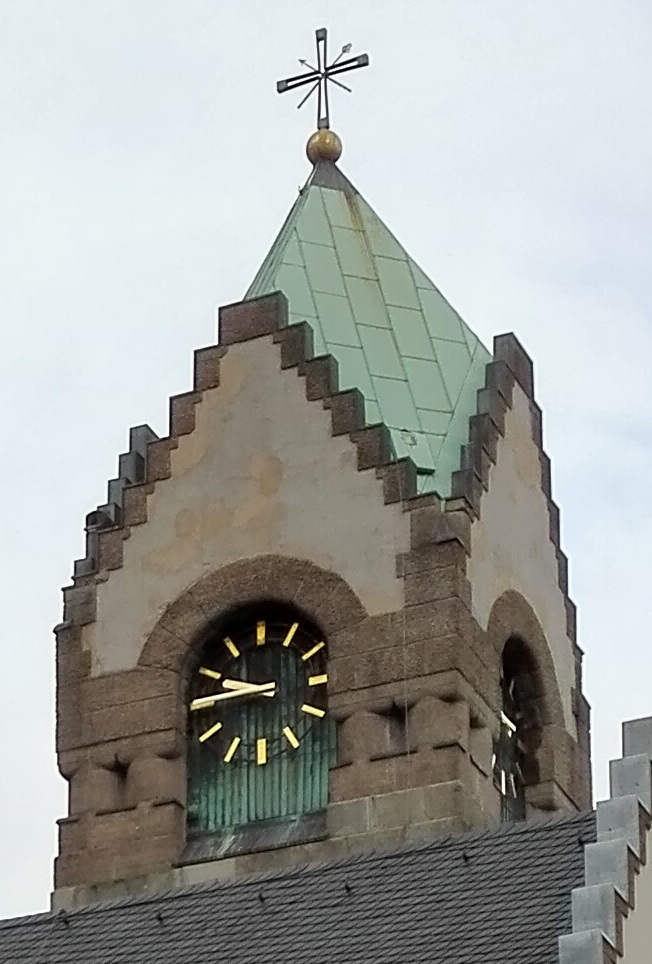 Ansichten der Lutherkirche im August 2017